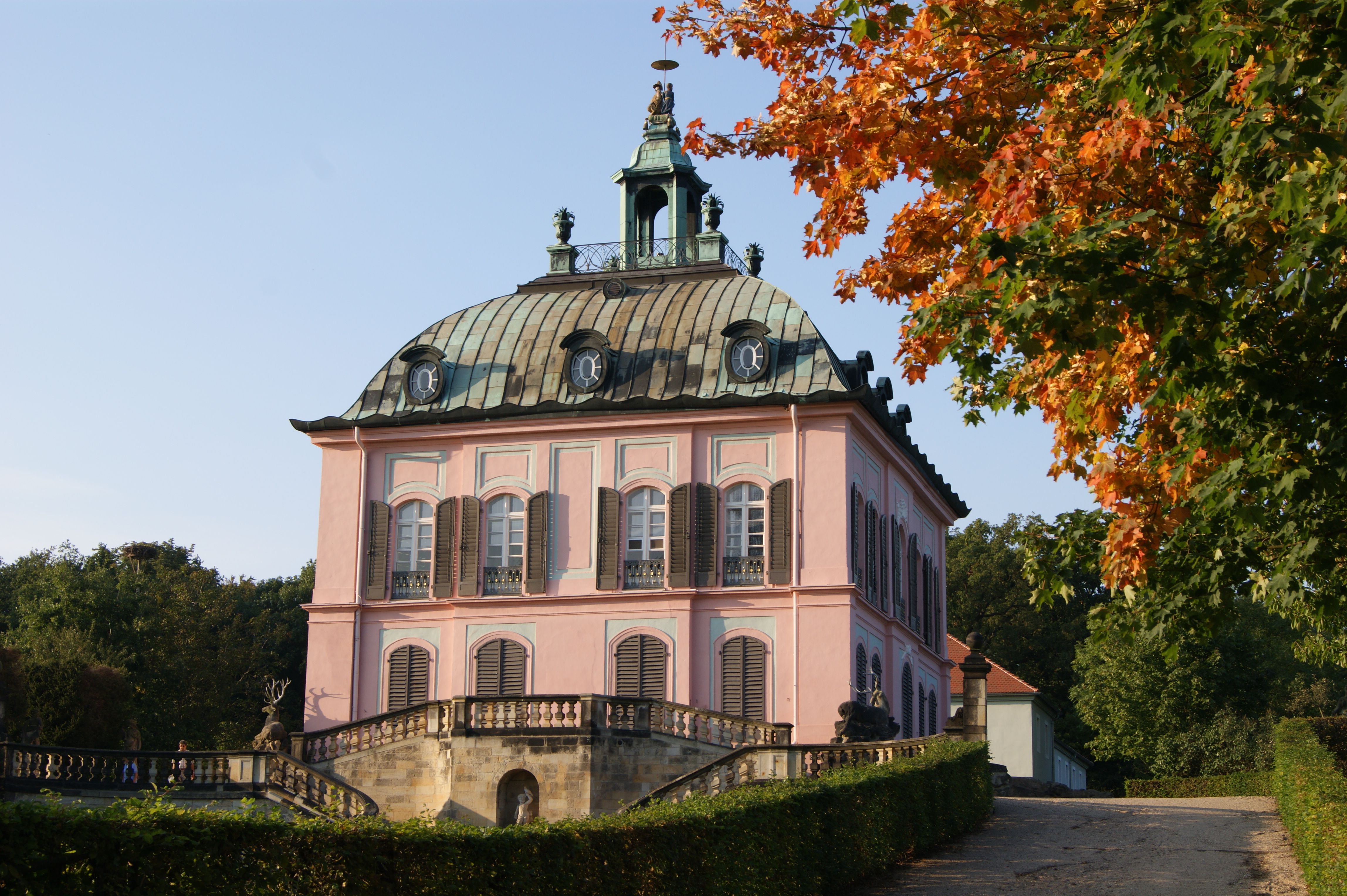 Fasanenschlösschen nahe dem Jagdschloss Moritzburg